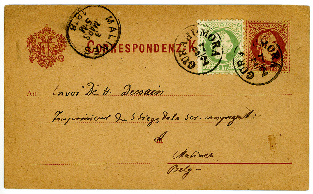 Carte pré-imprimée de 2 kreuzer, postée à GURAHUMORA (Bucovine) en 1878, vers la Belgique (plus 3 kr de port).